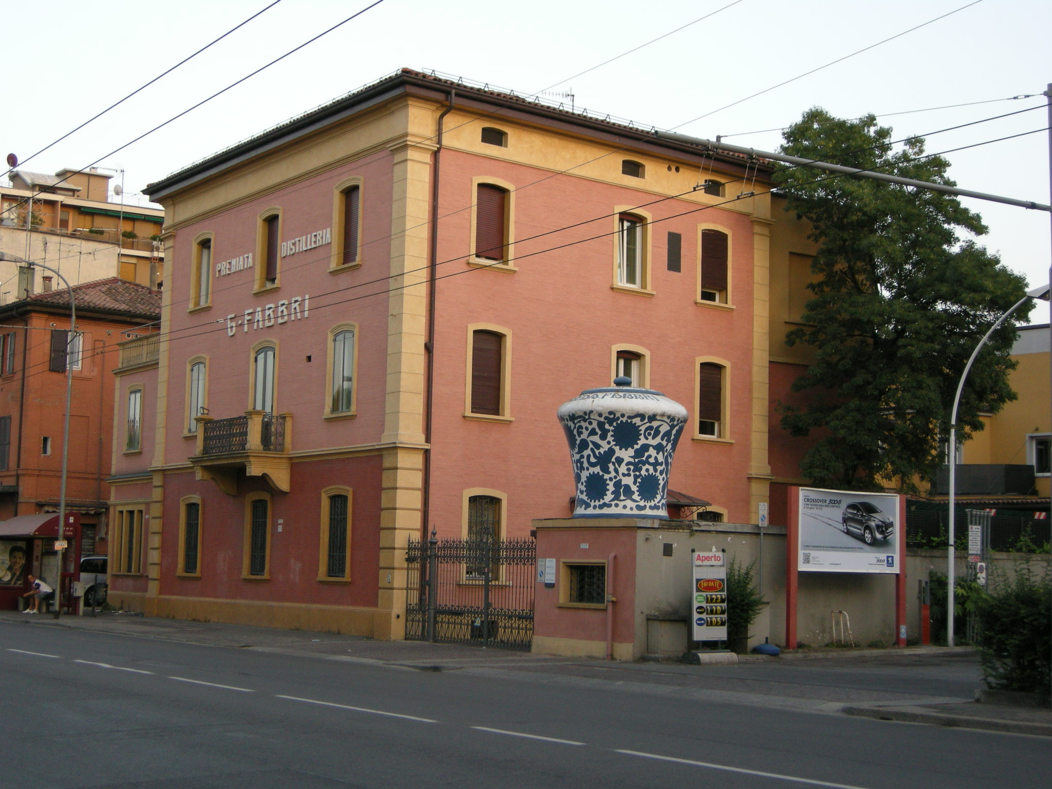 Borgo panigale, via emilia, manifattura fabbri